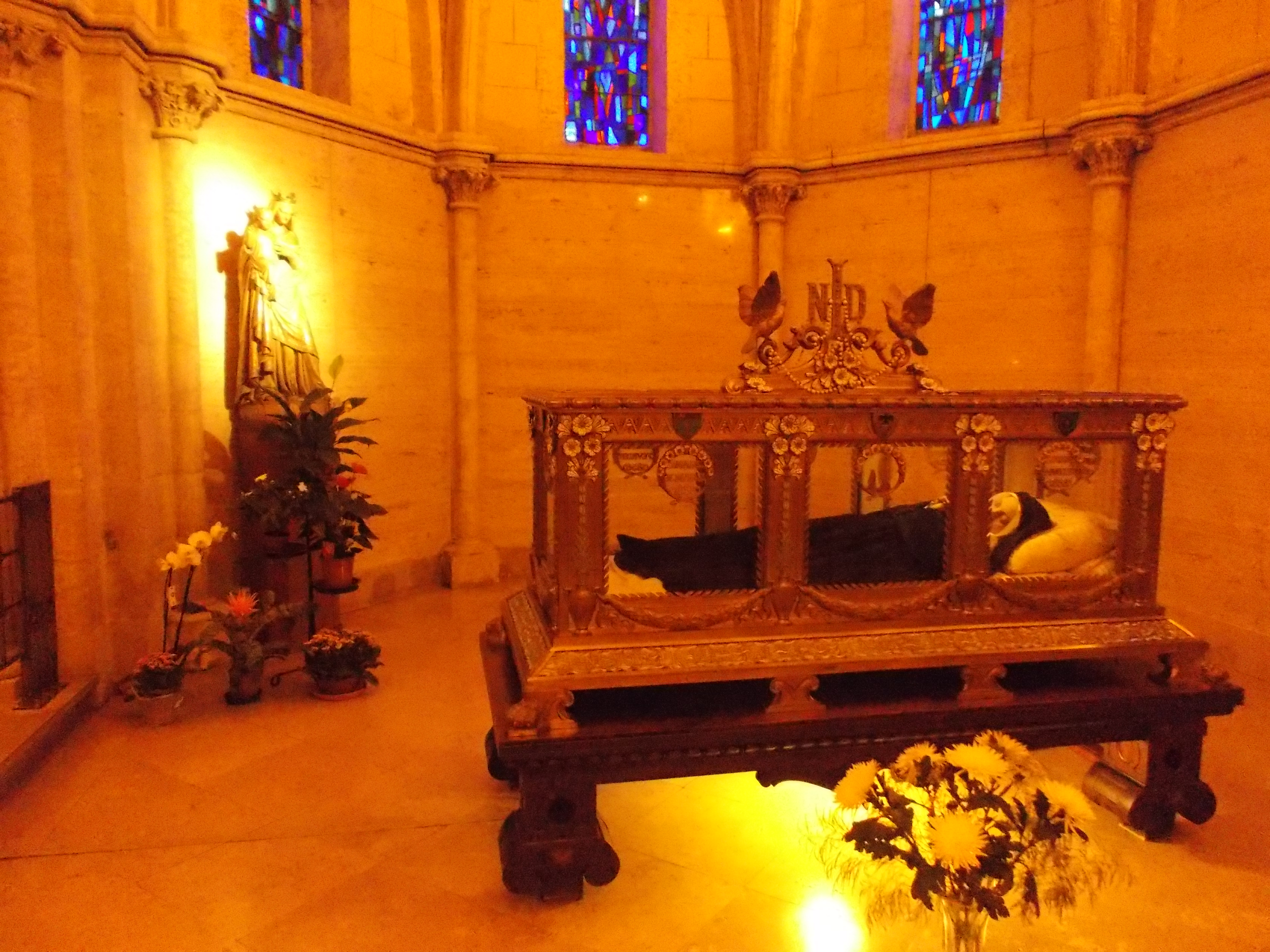 il sarcofago con le spoglie di Bernadette